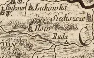 Iłowa na mapie Carte de la Pologne divisée par provinces et palatinats et subdivisée par districts construite par J. A. B. Rizzi Zannoni, Paryż 1772